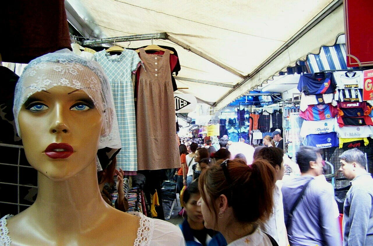 Pratunam Market